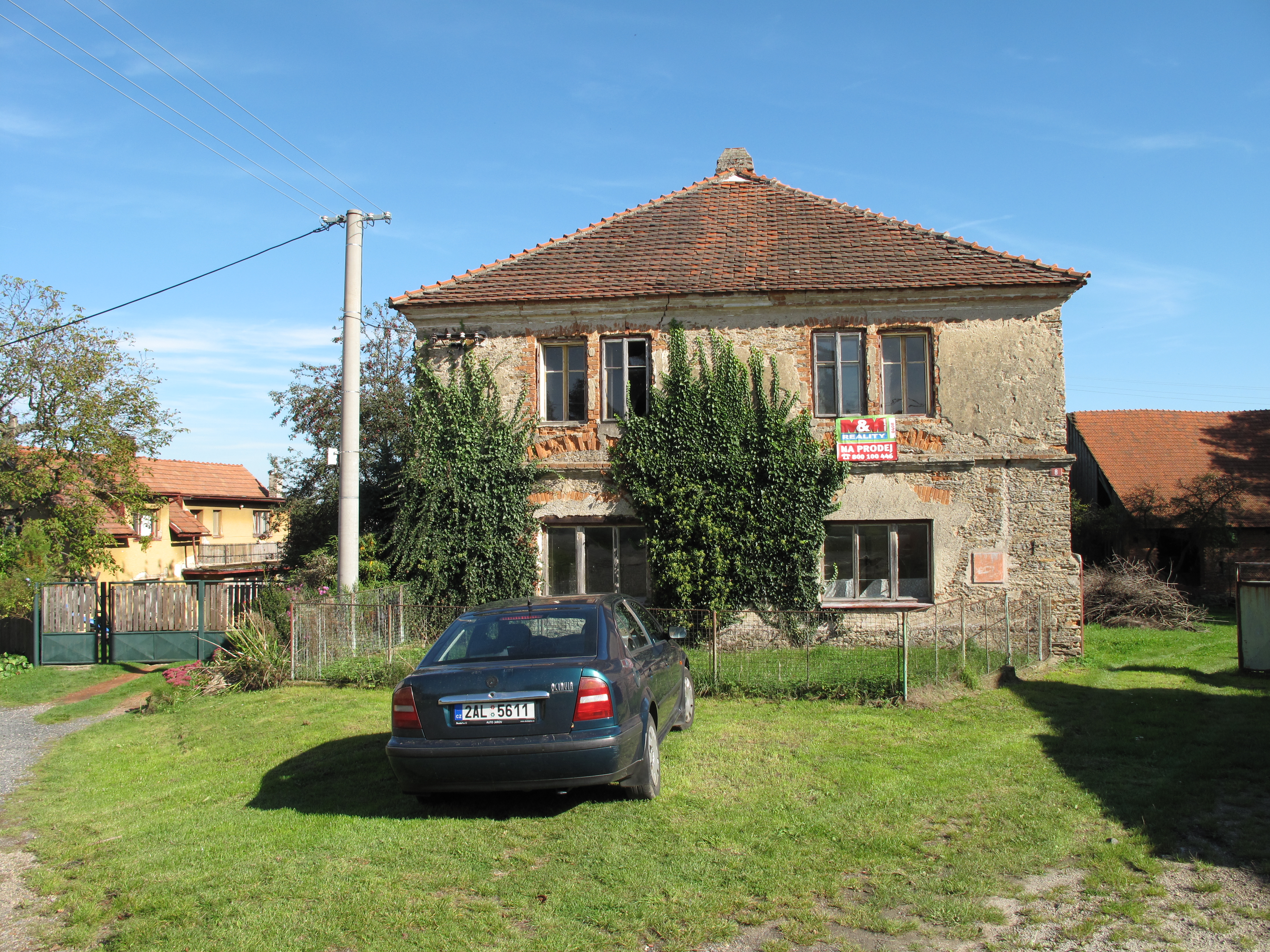 Auto před domem v Mitrově. Okres Kutná Hora, Česká republika.